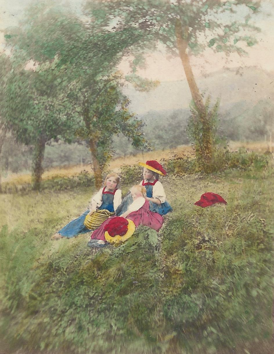 Ludovico Wolfgang Hart, getintete Fotographie aus der Galerie universelle des Peuples N° 46: Gutacher Tracht, 1864